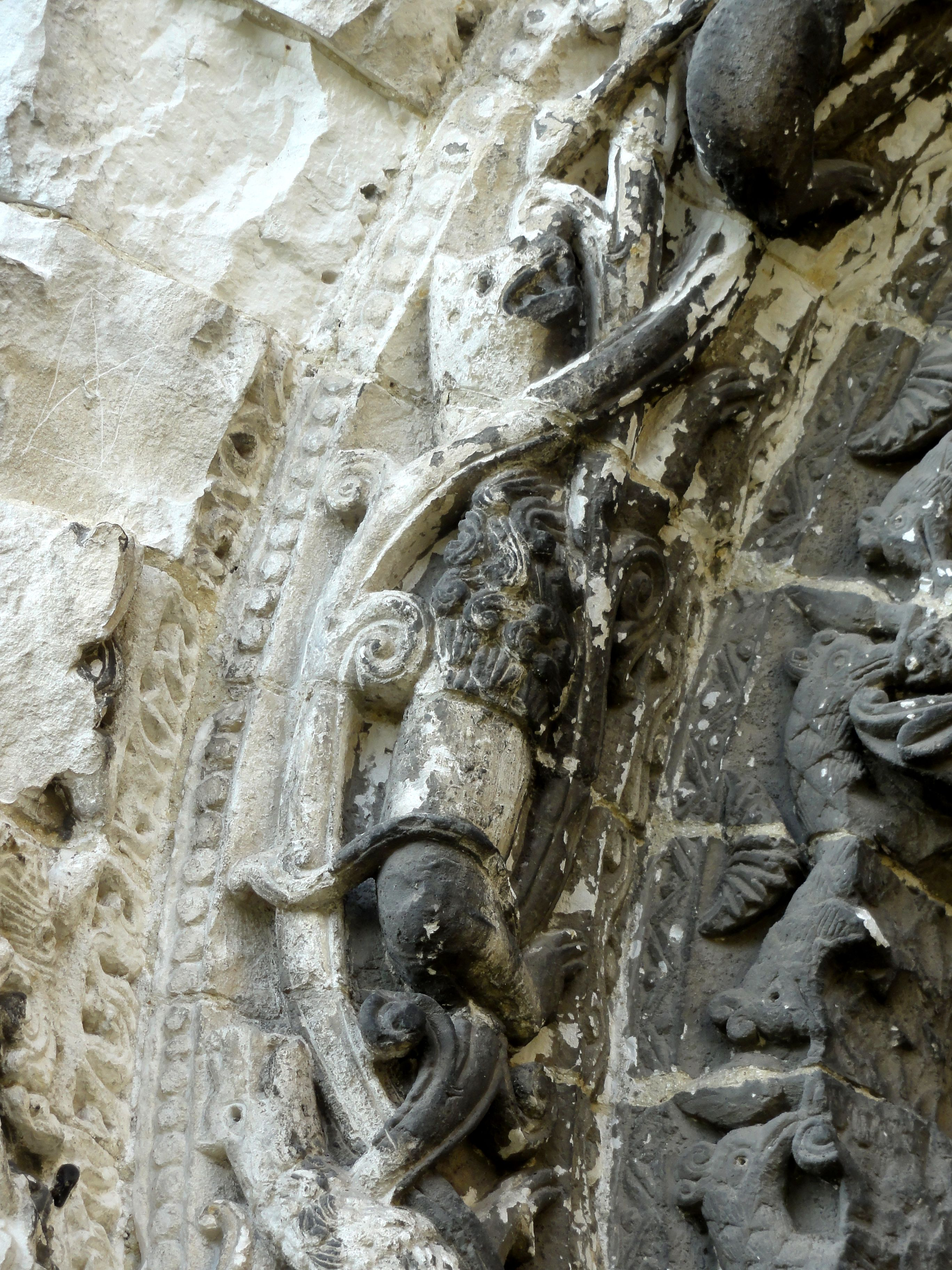 Portail nord, détail de la 3e archivolte.